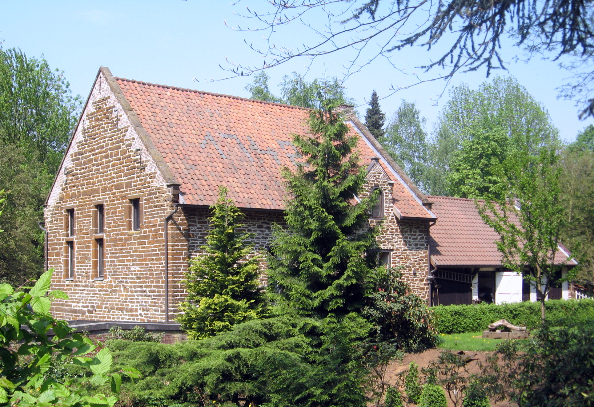 Meylandtmolen, watermolen 1742 in Heusden